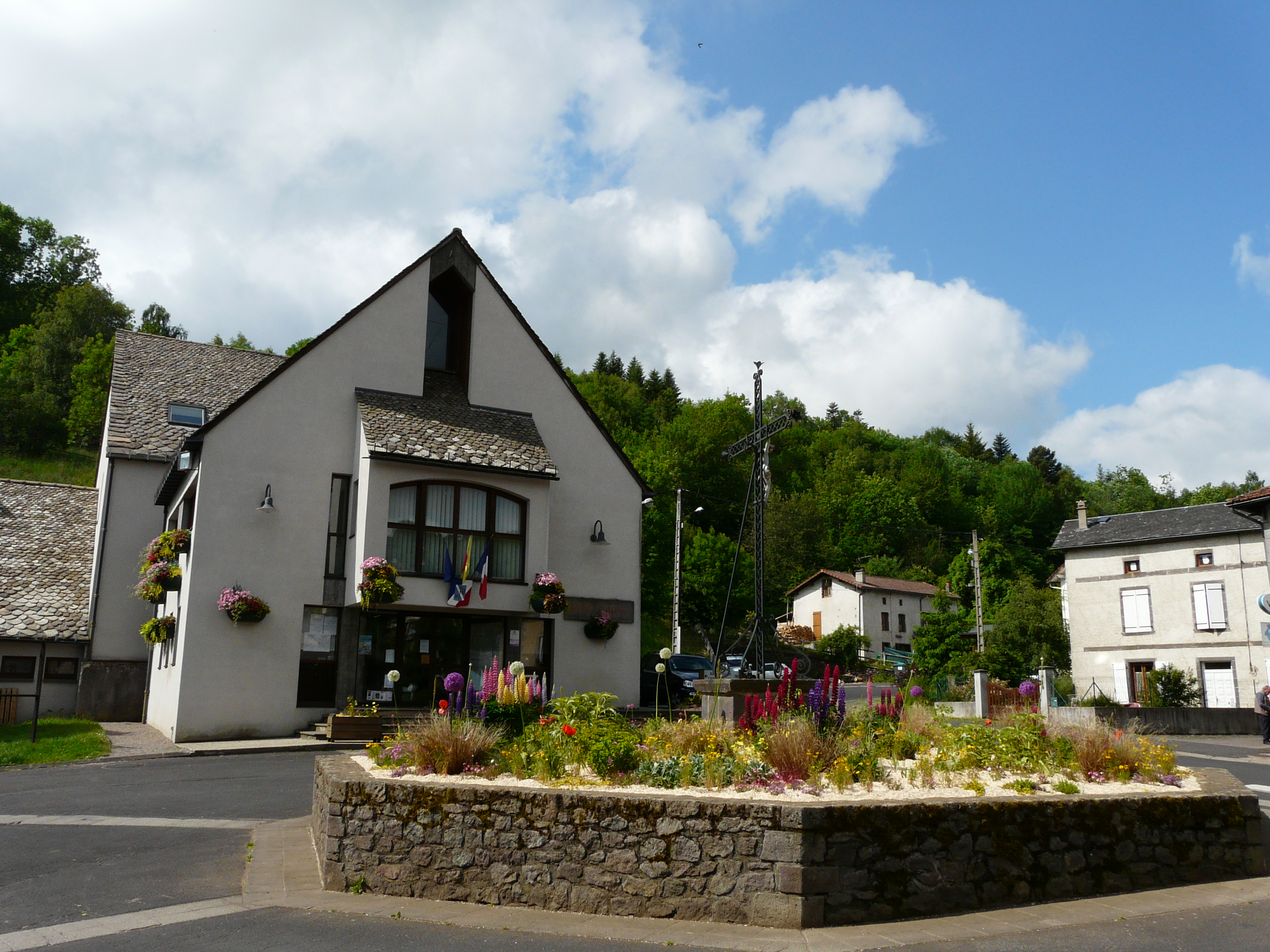 La mairie d'Aydat, Puy-de-Dôme, France.